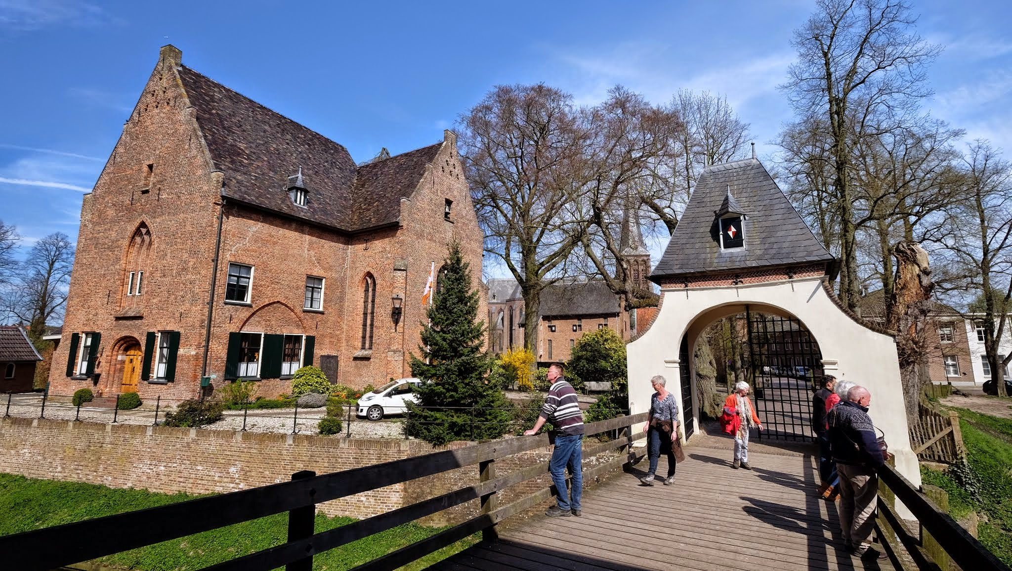 7041 's-Heerenberg, Netherlands